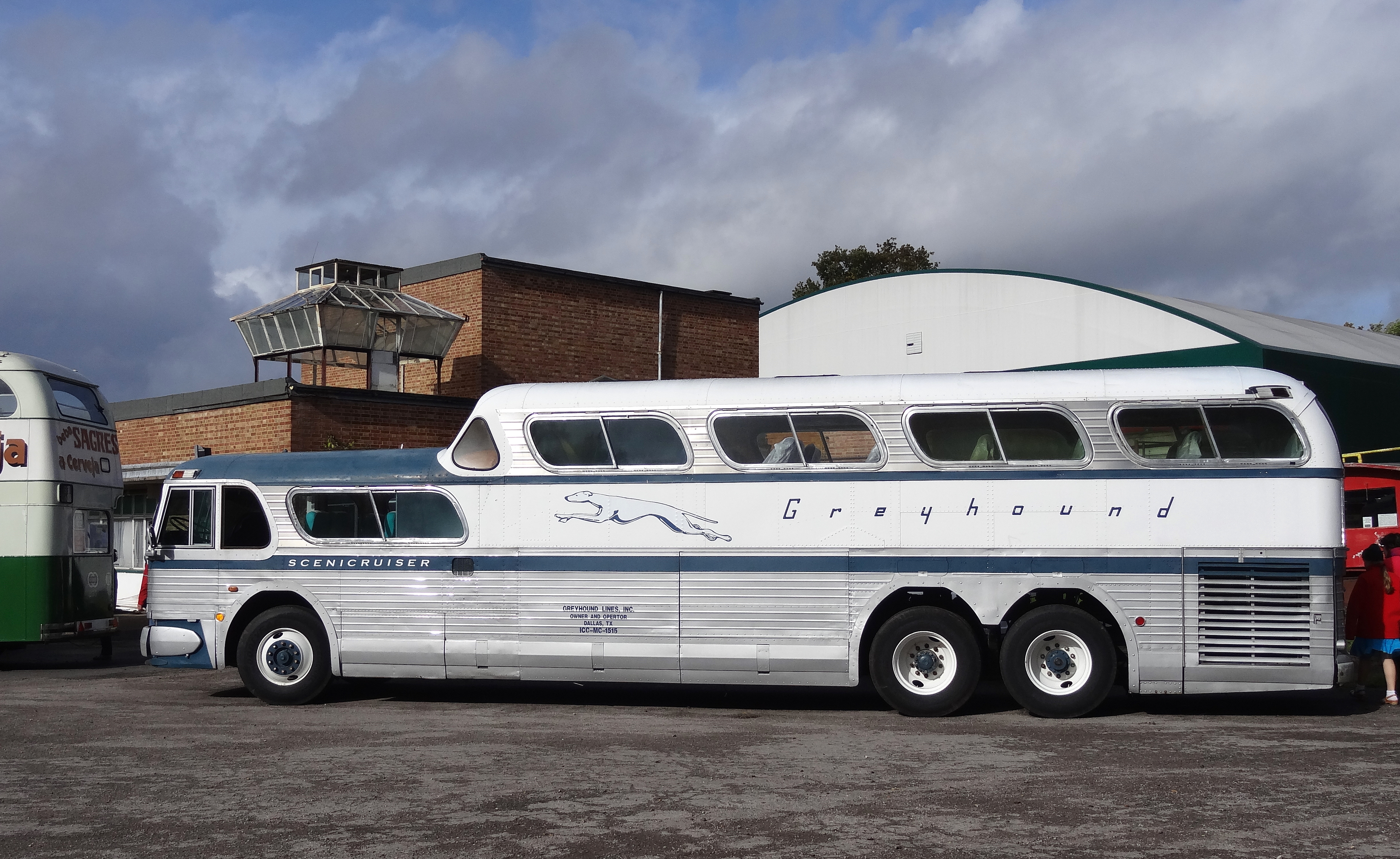 London Bus Museum Transportfest 2013 019